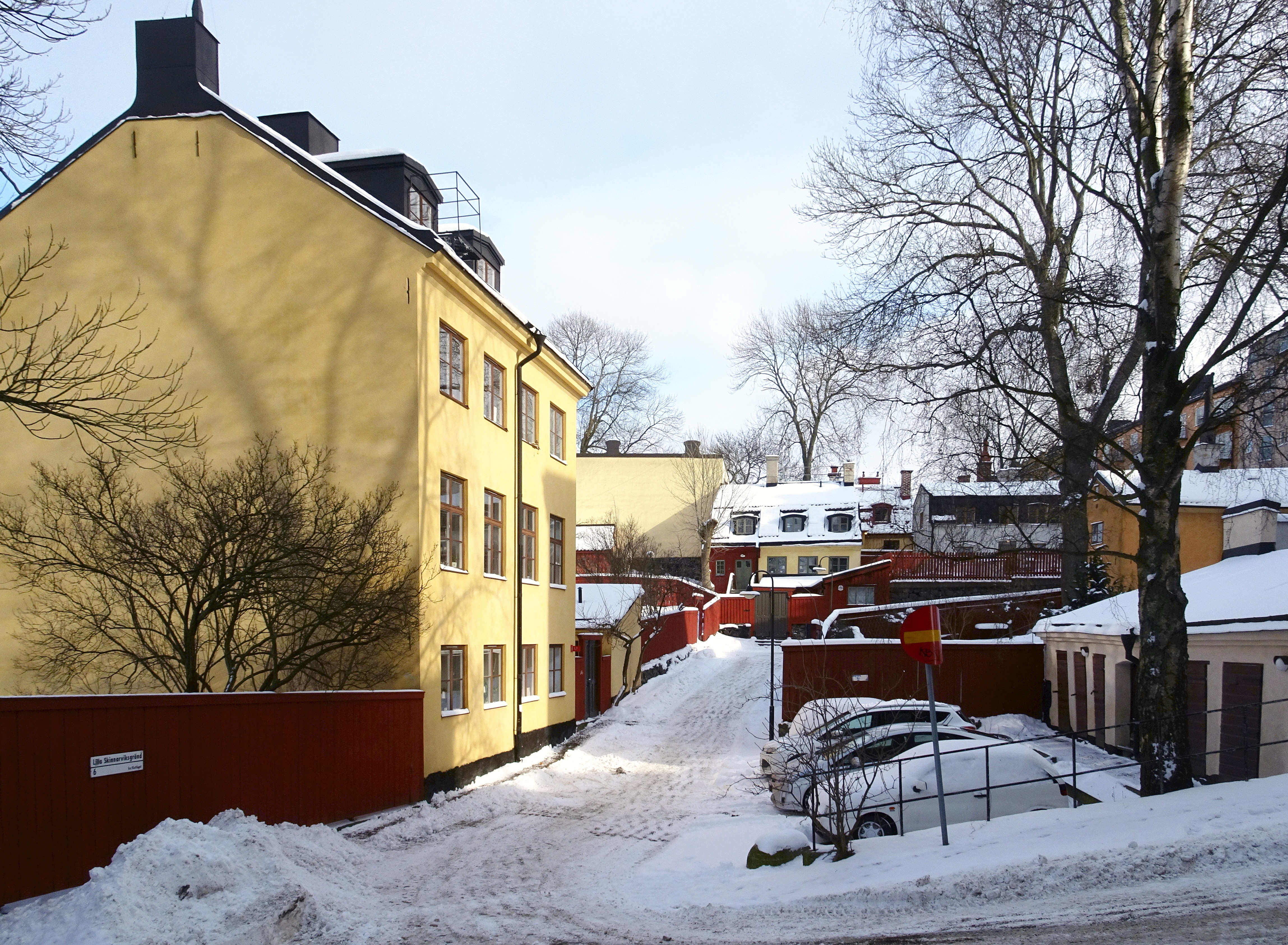 Lilla Skinnarviksgränd nr 6 mot öster